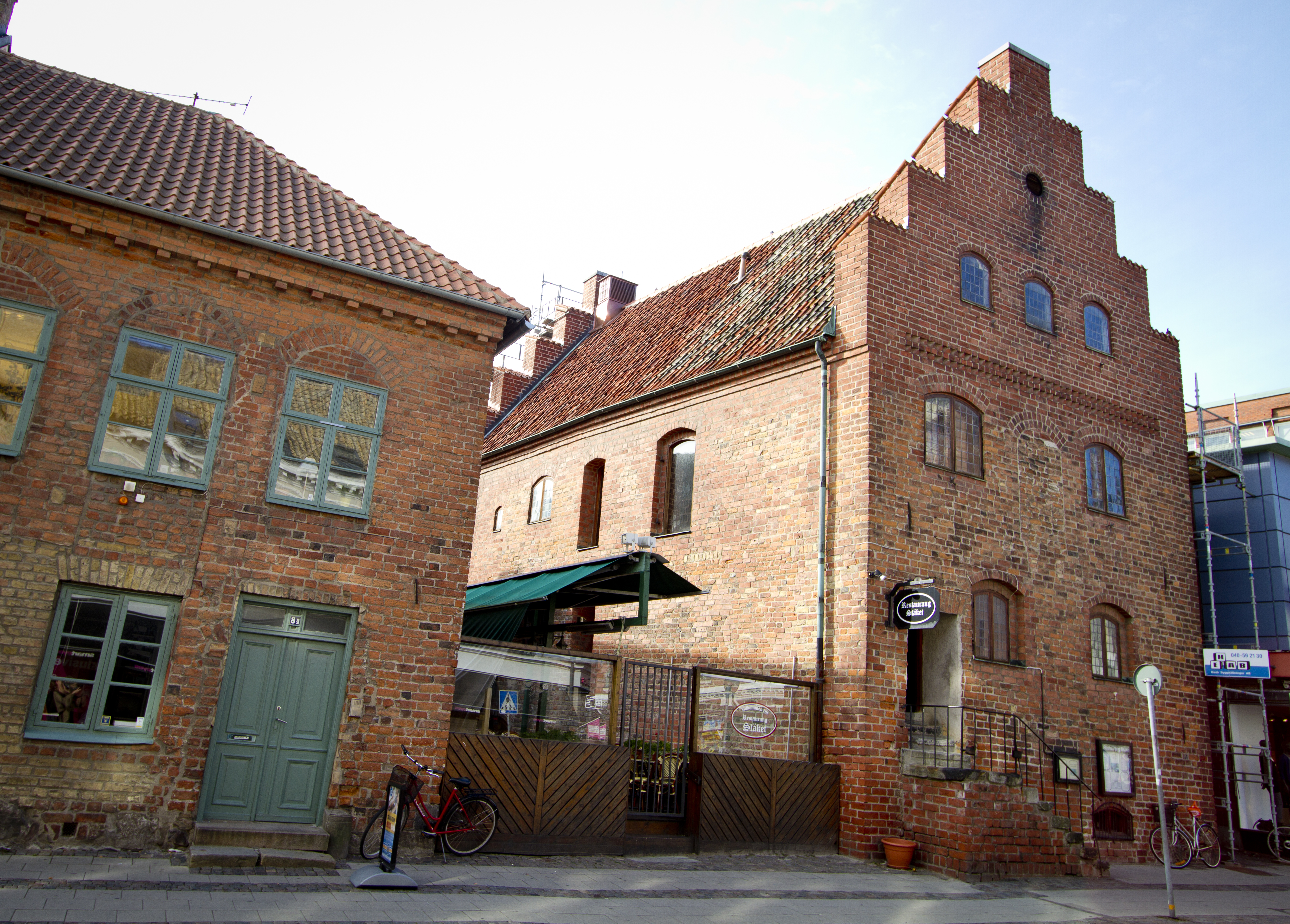 Stäket (Färgaren 26)